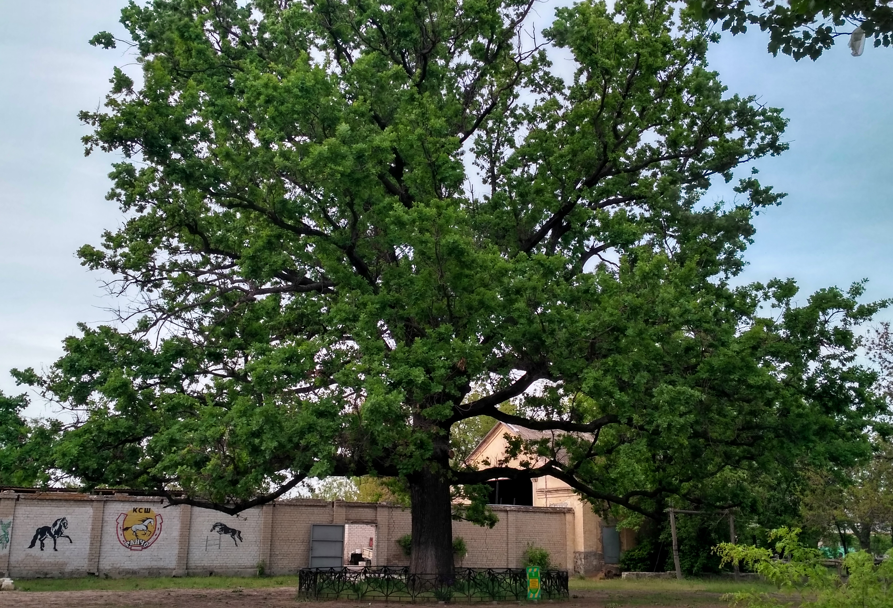 «Дуб черешчатий», м.Мелітополь